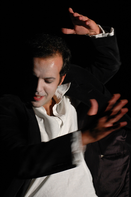 Mario Perrotta in "Odissea" - prima nazionale al Festival Bella Ciao di Ascanio Celestini